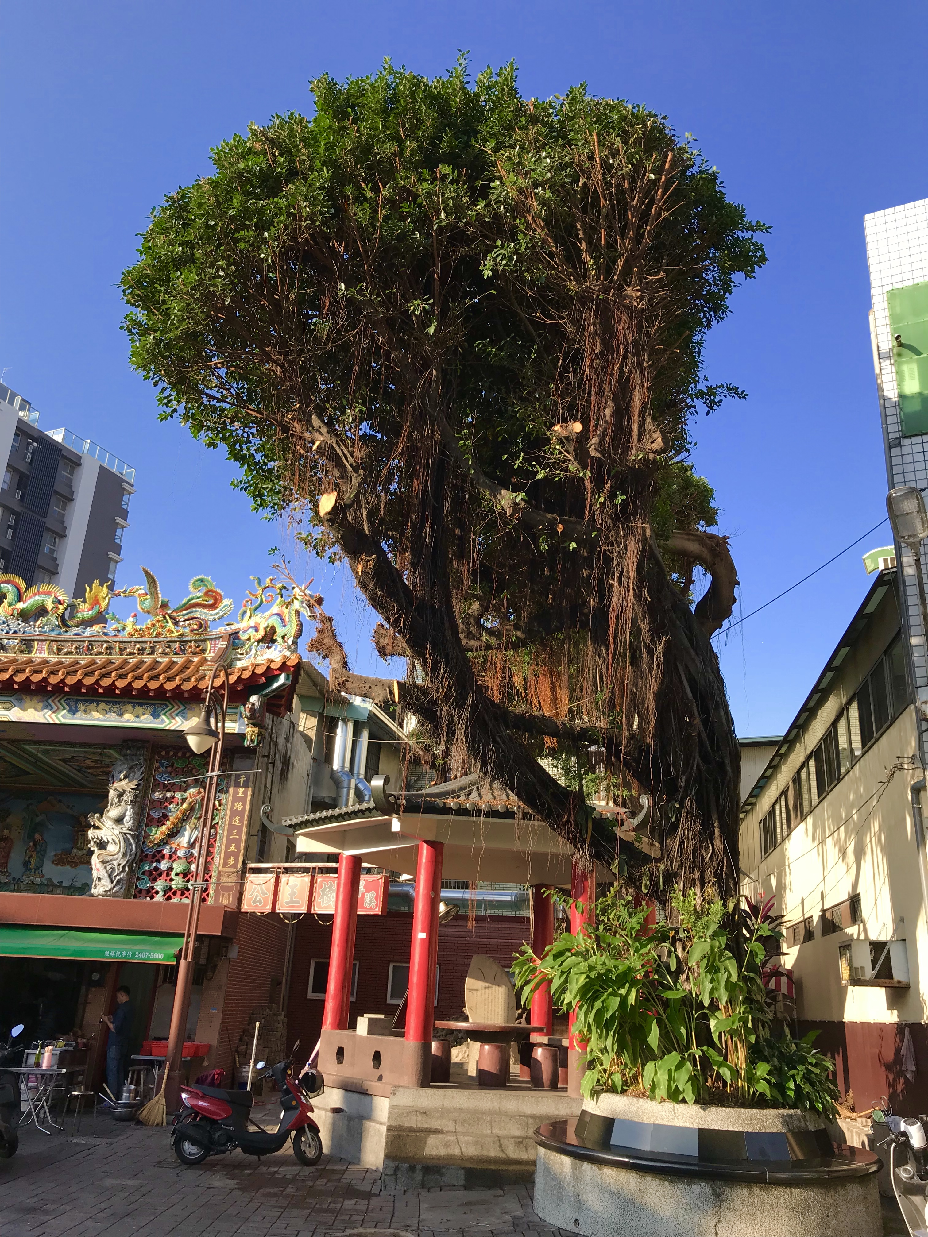 中文（台灣）: 旱溪樹王公